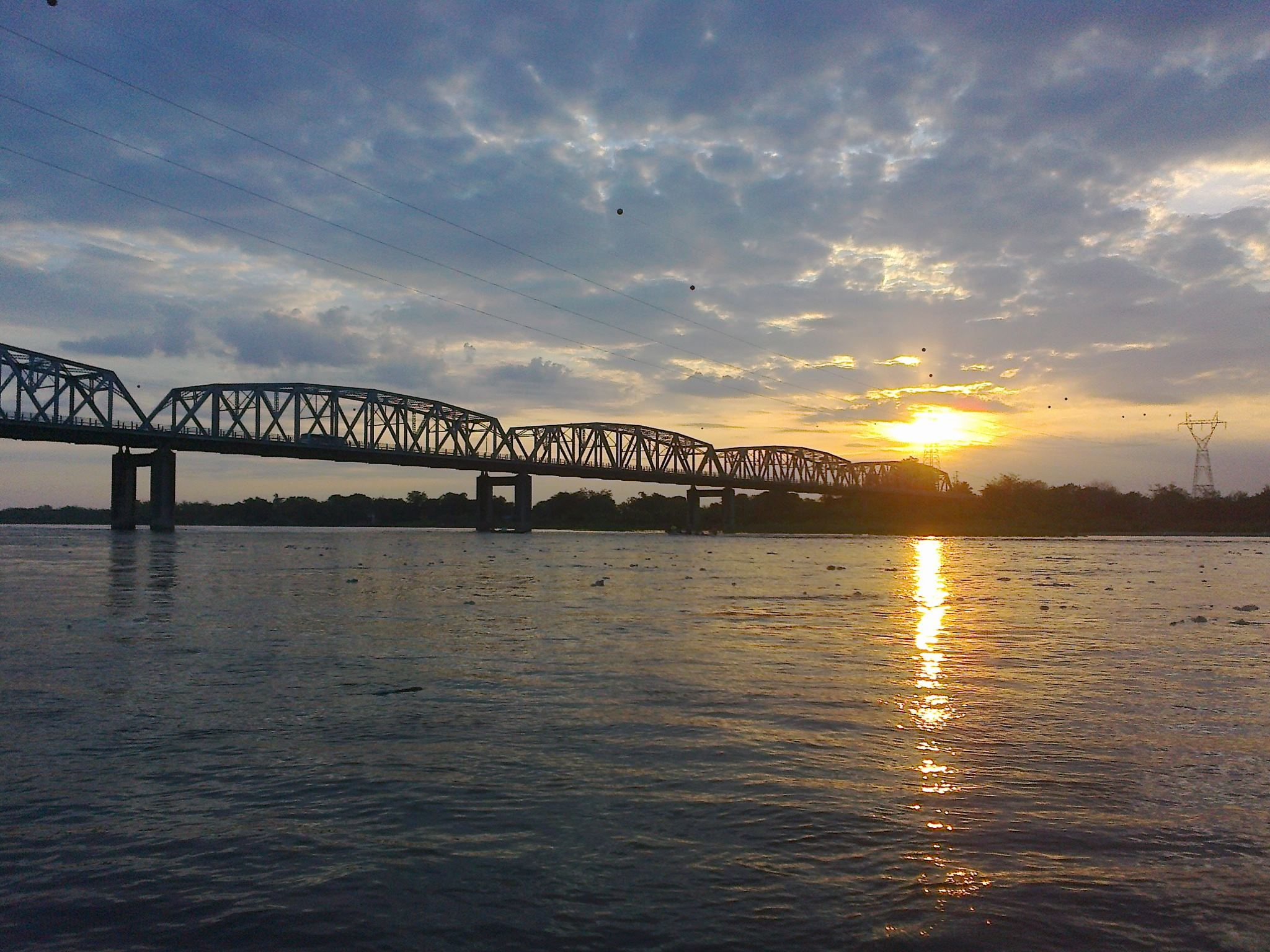 Foto del puente de Puerto Berrio al atardecer